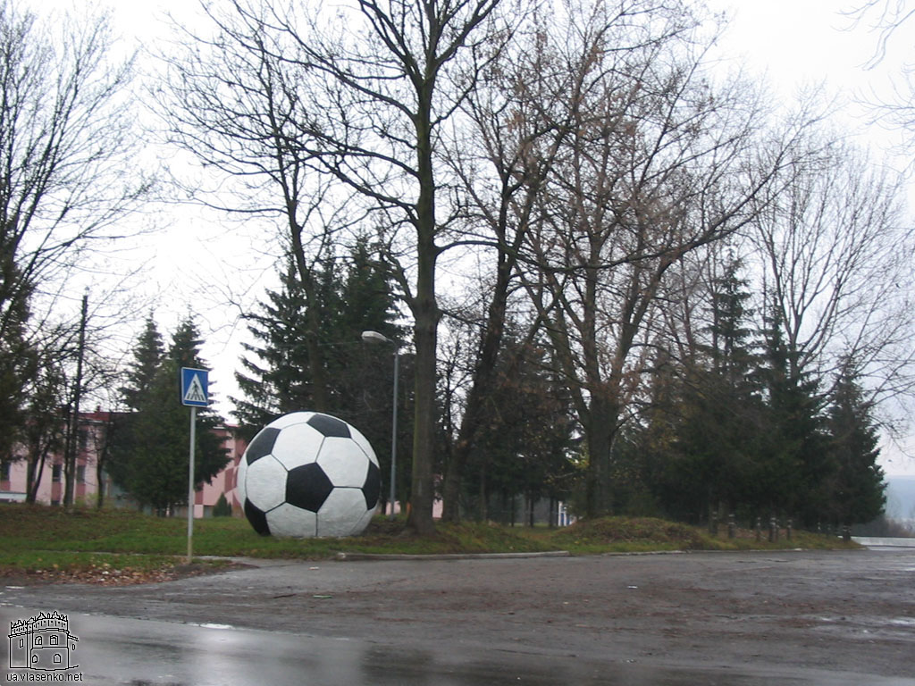 Скульптура футбольного м'яча біля спорткомплексу в місті Бурштині Івано-Франківської області (листопад 2004 року).